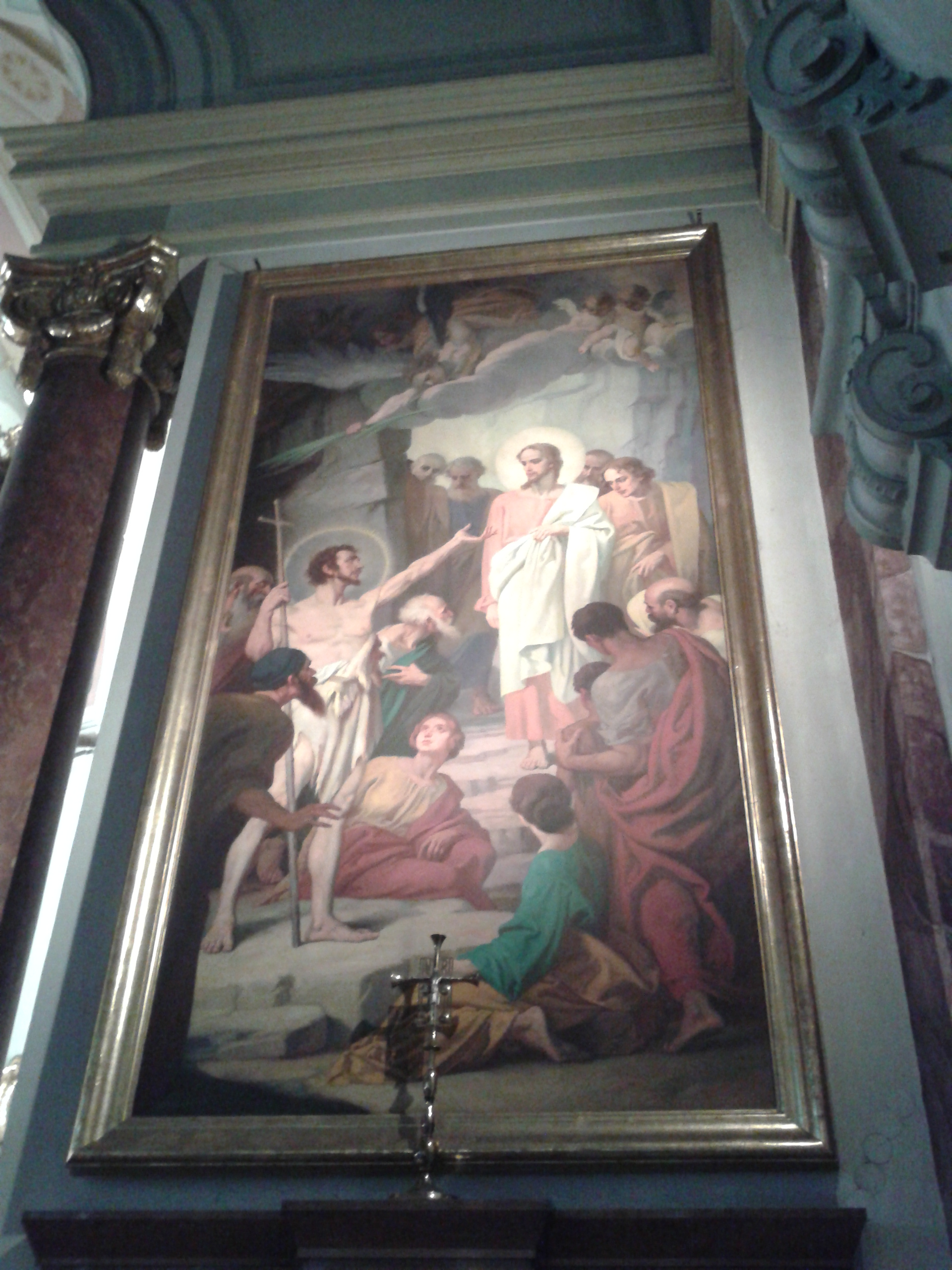 Bild des Rufers in der Wüste (Hl. Johannes der Täufer) an der Südseite des Hochaltars in der Stadtpfarrkirche St. Josef (Reinhausen)